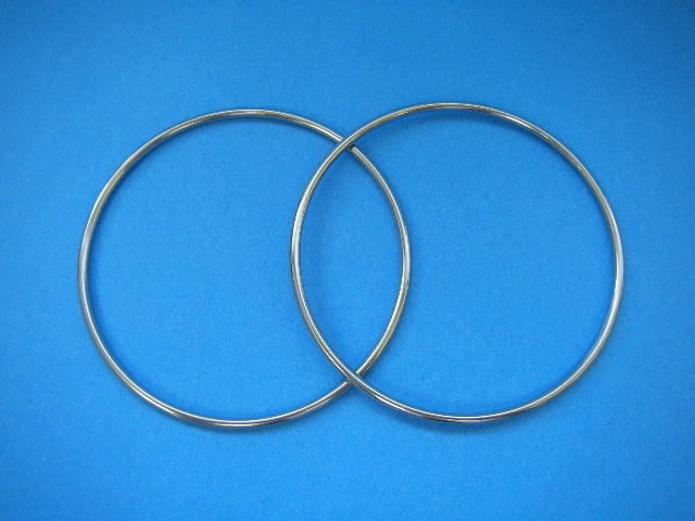 Metal Oseal